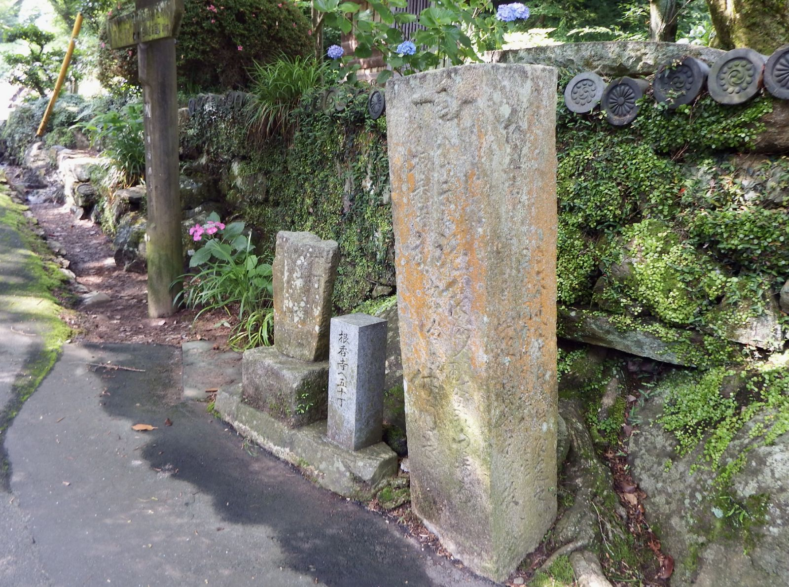 讃岐遍路道 根香寺道の起点